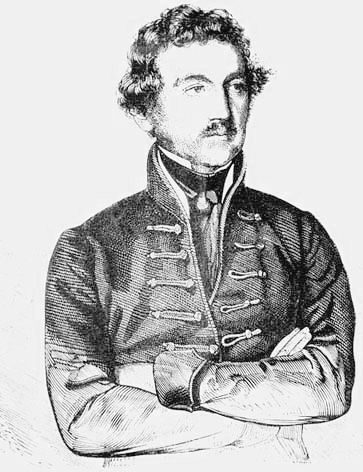 Fáy András (1786–1864) író, politikus (Vasárnapi Ujság, 1855. július 22.)